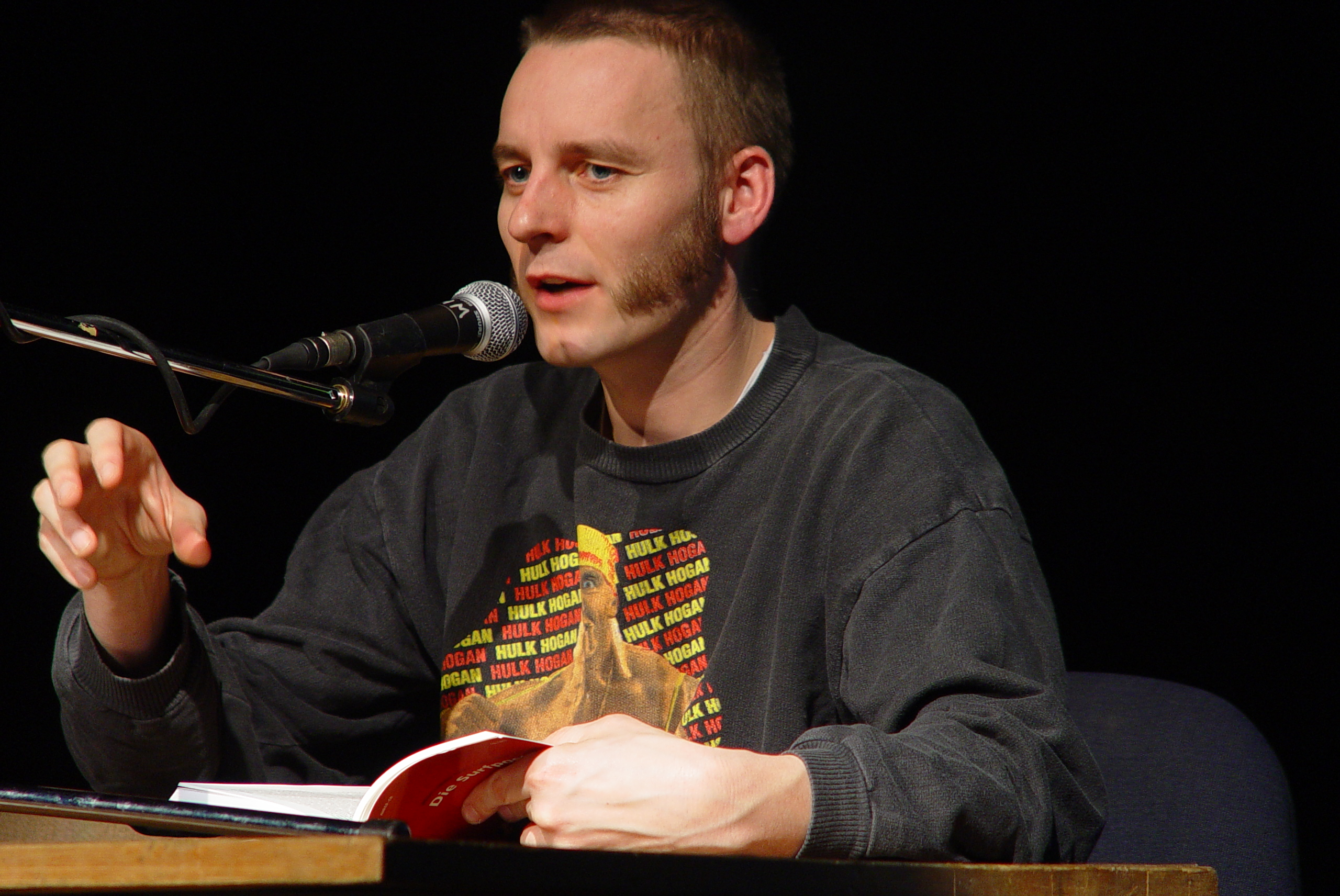 Ahne (eigentlich Arne Seidel) am 19. Dezember 2004 im Theaterhaus Mitte (Berlin)